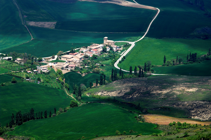 Reta - Izagaondoa, Nafarroa.